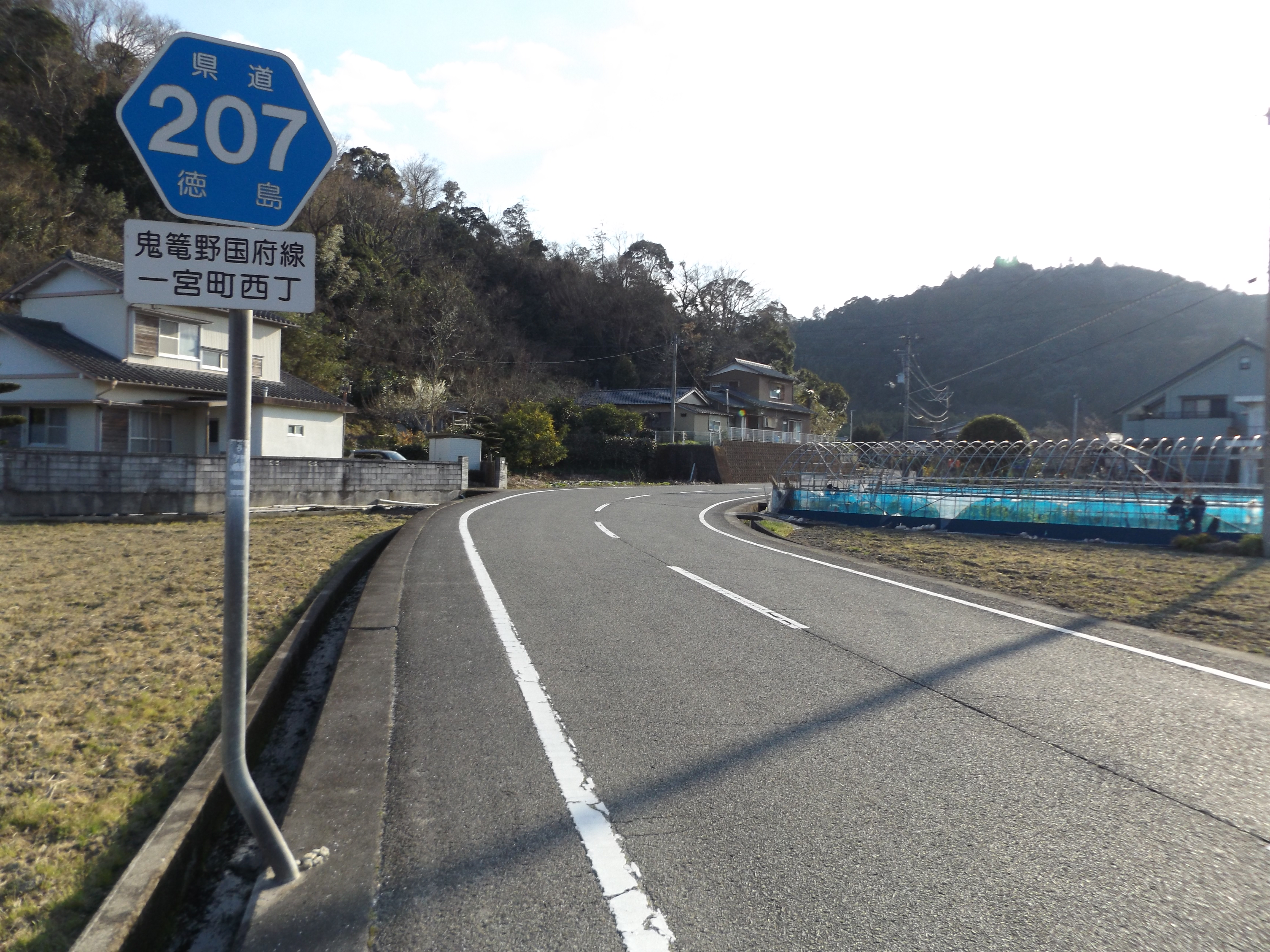 徳島市一宮町西丁を通る徳島県道207号鬼籠野国府線。